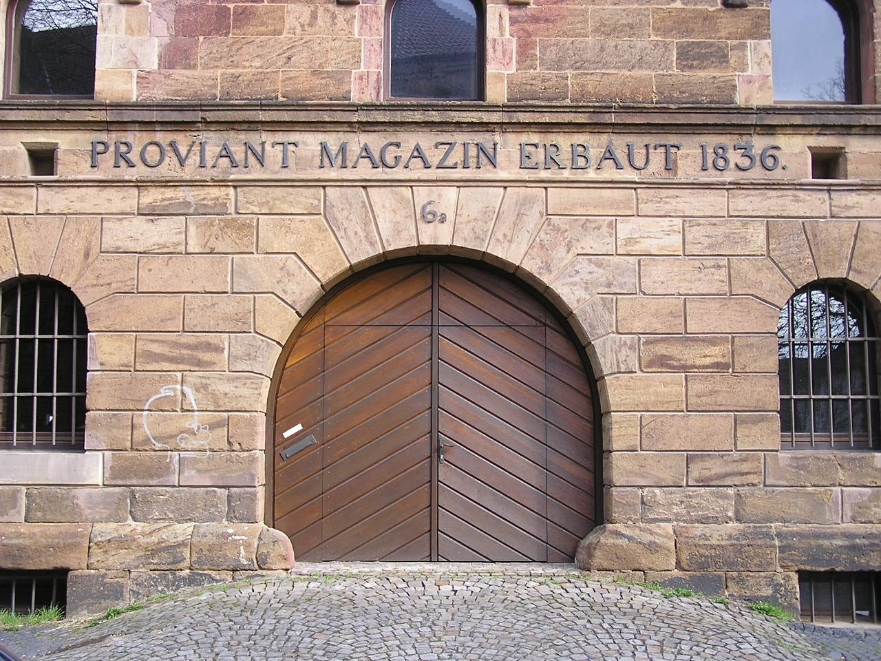 Das Proviant-Magazin in Minden, Nordrhein-Westfalen. Das Magazin diente der Versorgung der in Minden stationierten preußischen Truppen und war Teil des Festungskomplexes Festung Minden. Inschrift über dem Portal:PROVIANT MAGAZIN ERBAUT 1836. Das vierstöckige, neo-romanische Proviant-Magazin (von den Mindenern auch Körnermagazin genannt) wurde von 1835 bis 1836 als Teil der Festung Minden erbaut und umfasst 3.360 Quadratmeter. Das Dachgeschoss ist mit einer Bombenbalkendecke sowie Schneeboden ausgestattet. Die Außenwände sind mit Porta-Sandstein verblendet. In den letzten Kämpfen um Minden im Zweiten Weltkrieg wurde es von deutschen Truppen angesteckt, als diese das linke Weserufer verließen. Es brannte aus und war 30 Jahre eine Ruine. Seit 1975 beherbergt es eine Schule, das Weser-Kolleg.